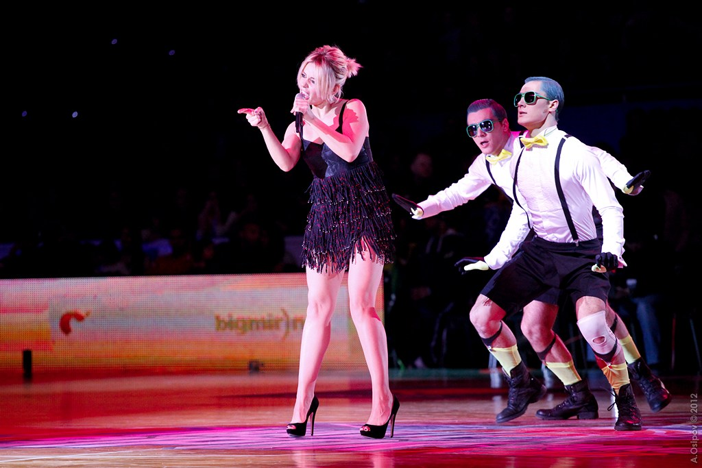 Матч всех звезд баскетбольной Суперлиги 2012. Киев. Ukrainian All-star